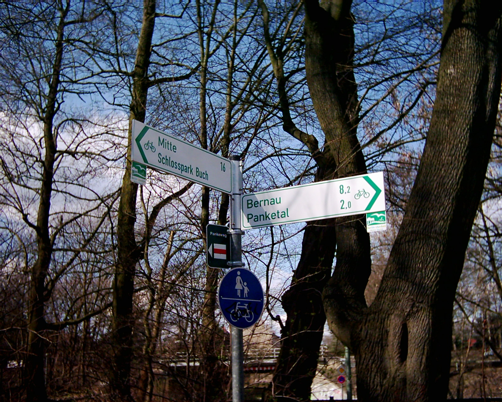 Der Pankewanderweg verläuft als Teil des Fernwanderweges Budapest-Kopenhagen auch durch den Schlosspark in Berlin-Buch. Der Wegweiser am südlichen Ende des Parkes weist 8,2 km bis nach Bernau der Quelle der Panke und 16 km bis Berlin-Mitte, der Ortsteil in dem sich die Mündung der Panke befindet.